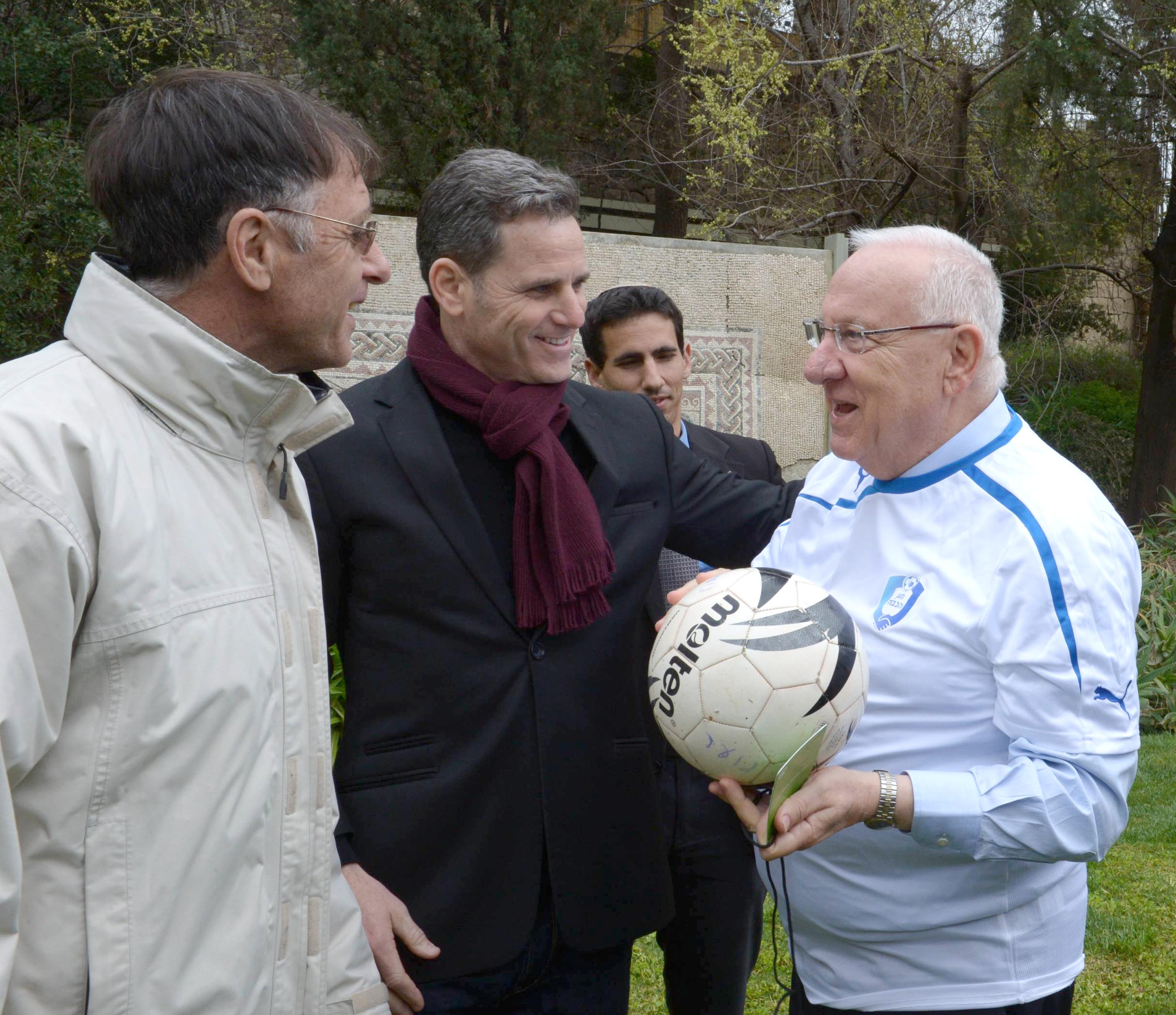 ראובן ריבלין נשיא המדינה מציג לראשונה במשכן הנשיא את "מגן הכבוד"- "נותנים כבוד לכדורגל".